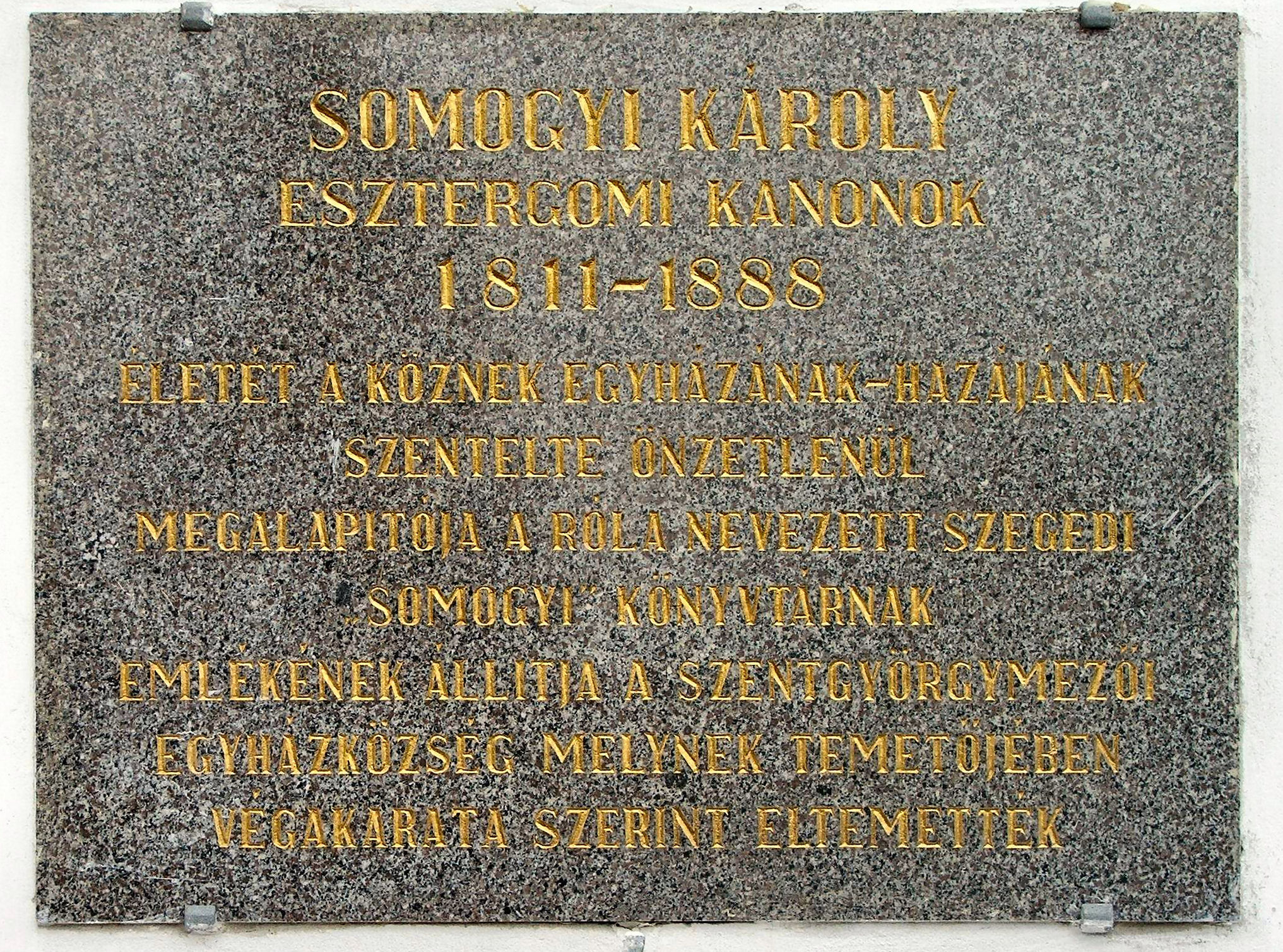 Priest Károly Somogyi plaque in Miklósffy Chapel, Esztergom